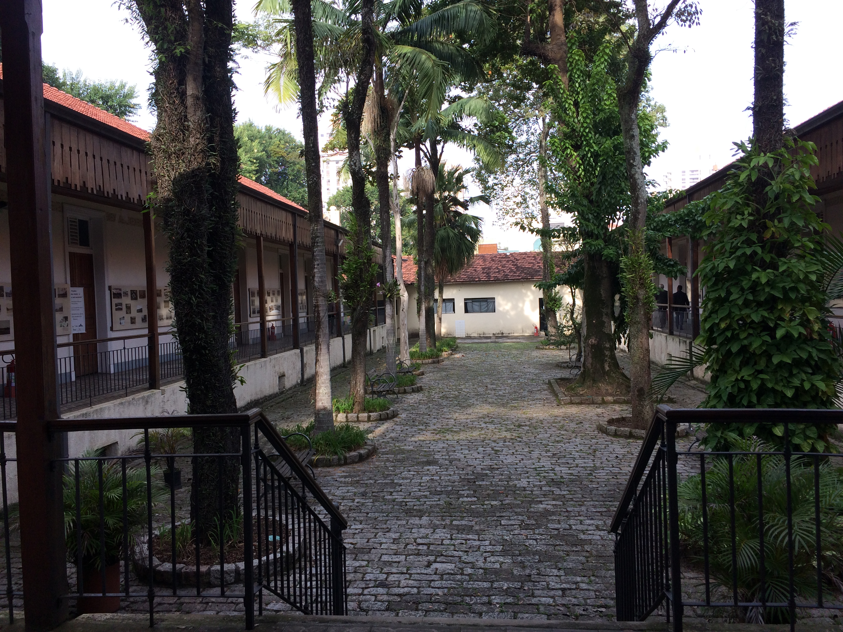 Frente do jardim principal do Museu de Santo André Dr. Octaviano Armando Gaiarsa, em Santo André (SP), Brasil.